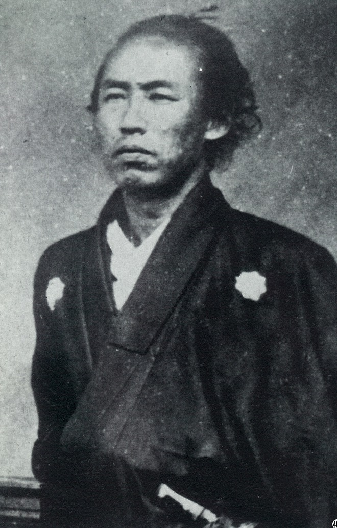 坂本龍馬の写真